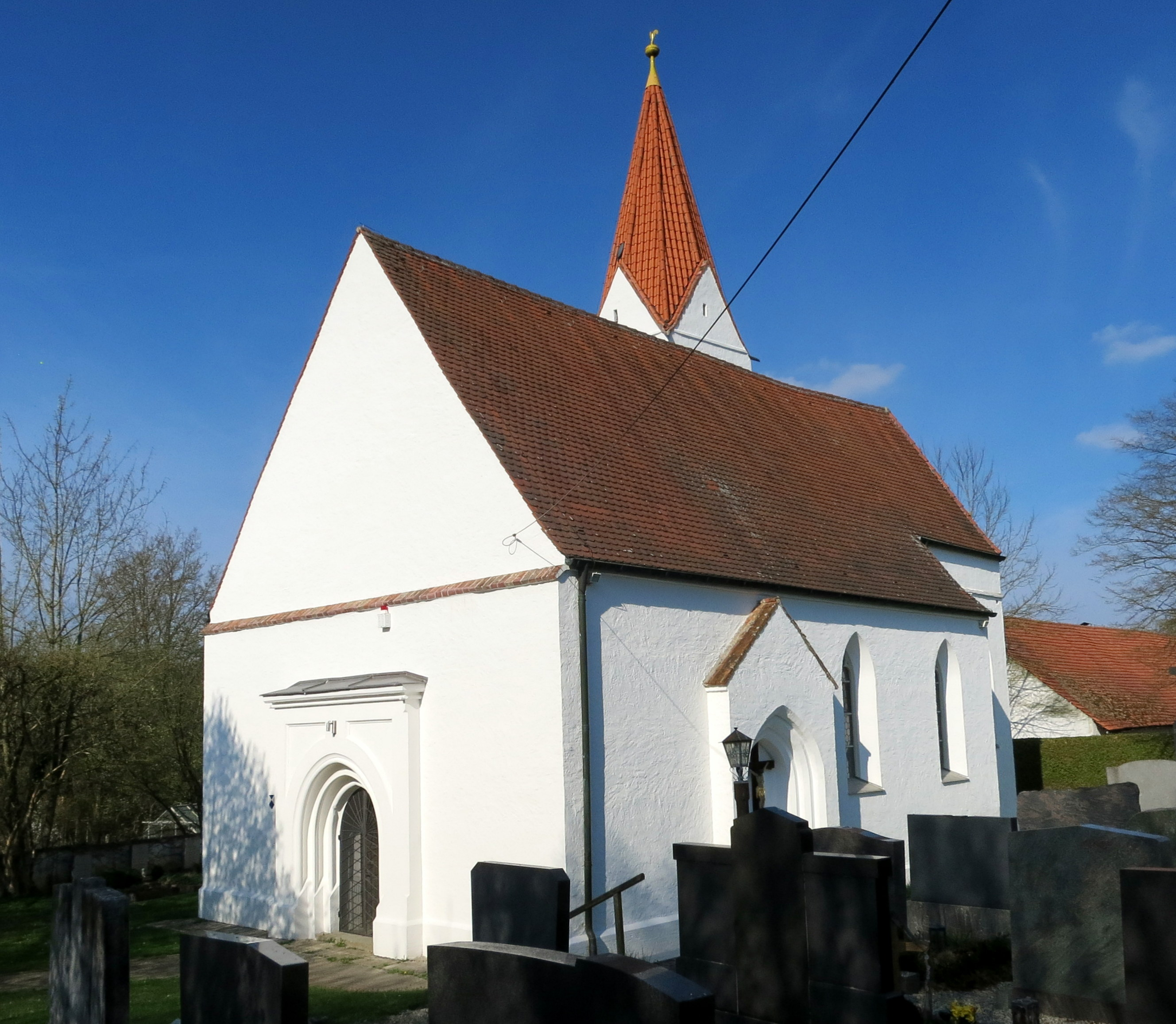 Eine am Rande des Ortsteils schön gelegene gotische Filialkirche